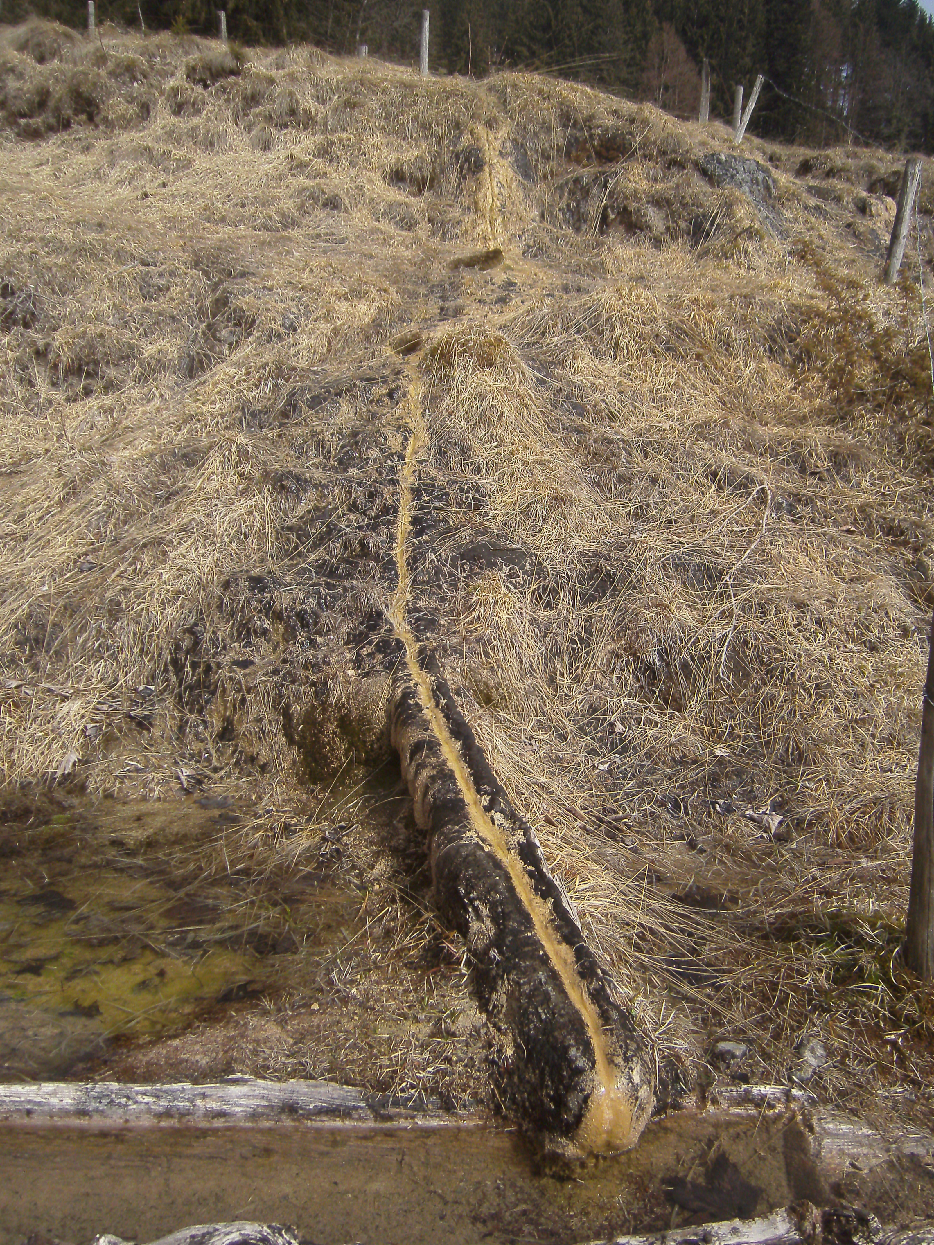 Steinerne Rinne in der Nähe von Wackersberg (bei Bad Tölz) - rechte Rinne